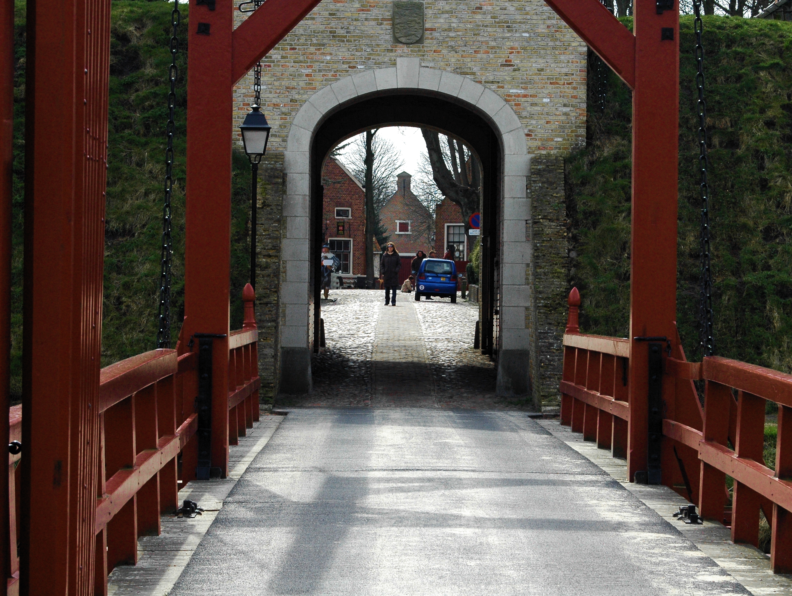 Bourtange, historische Festung, Tor und Zugbrücke